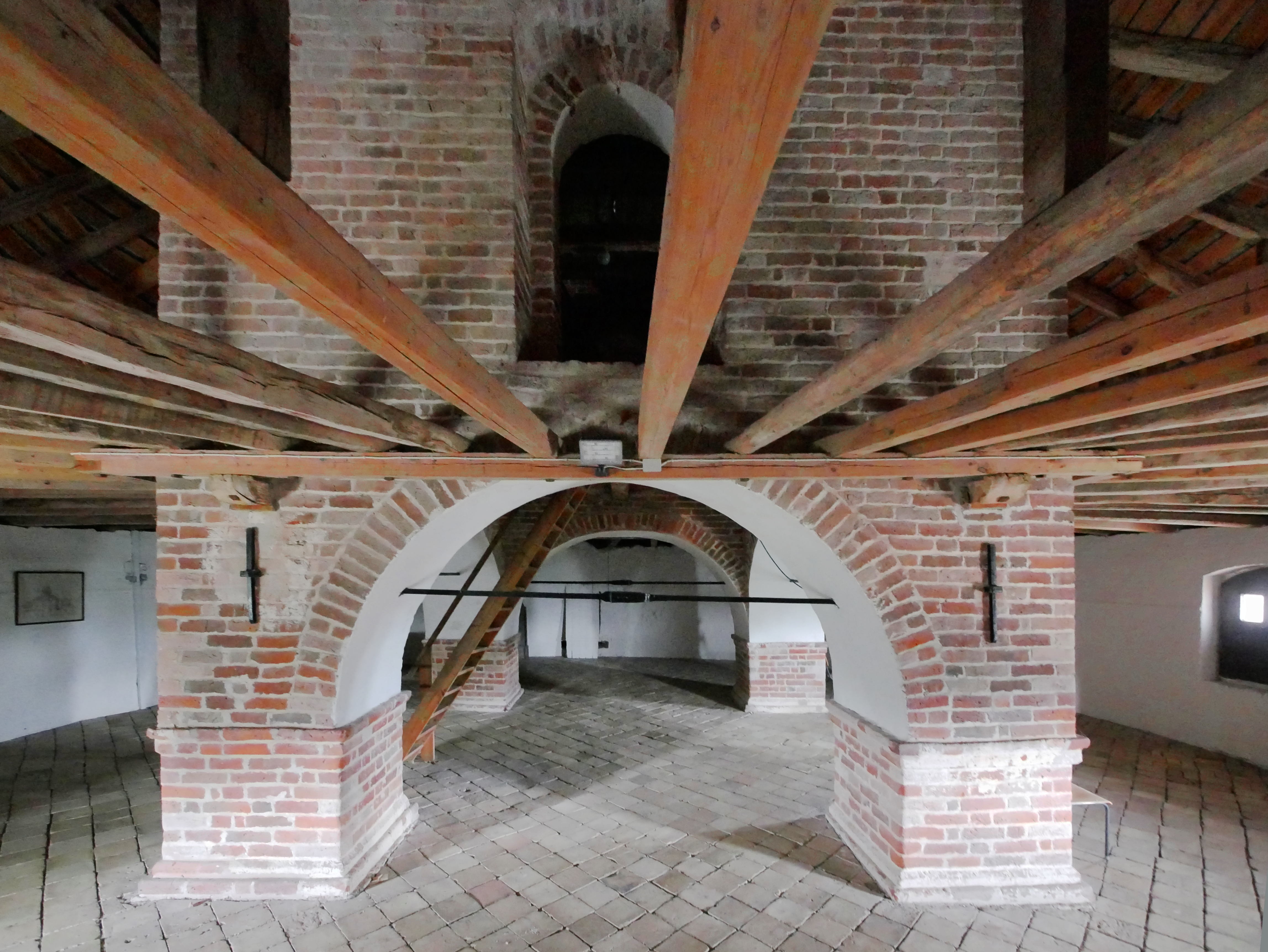 Kirche in Thorsager, Djursland, Dänemark - Raum oberhalb des Kirchenraums und Dachstuhl. In Fortsetzung der Säulen im Innenrau, sieht man das unterste Geschoß des viereckigen Turmaufbaus.